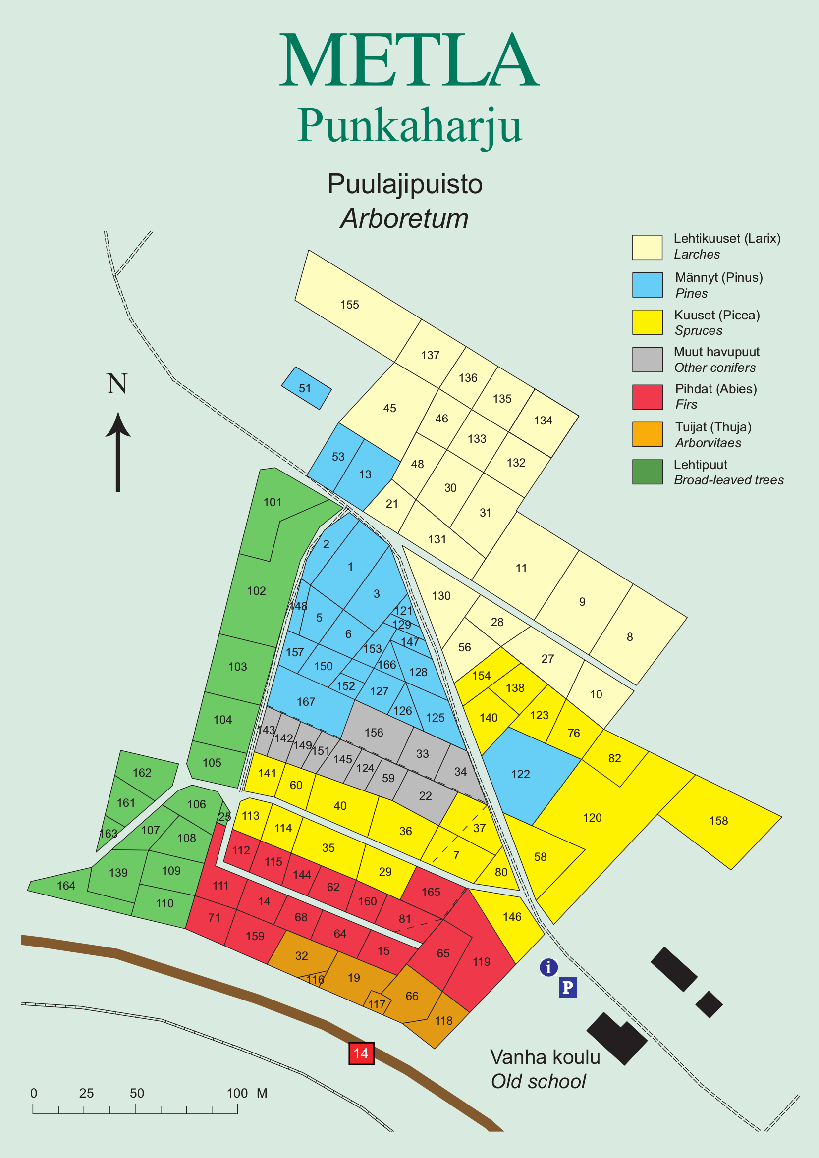 Arboretum Pukaharju, Parzellenplan mit Farbsignatur für Baum-Spezies